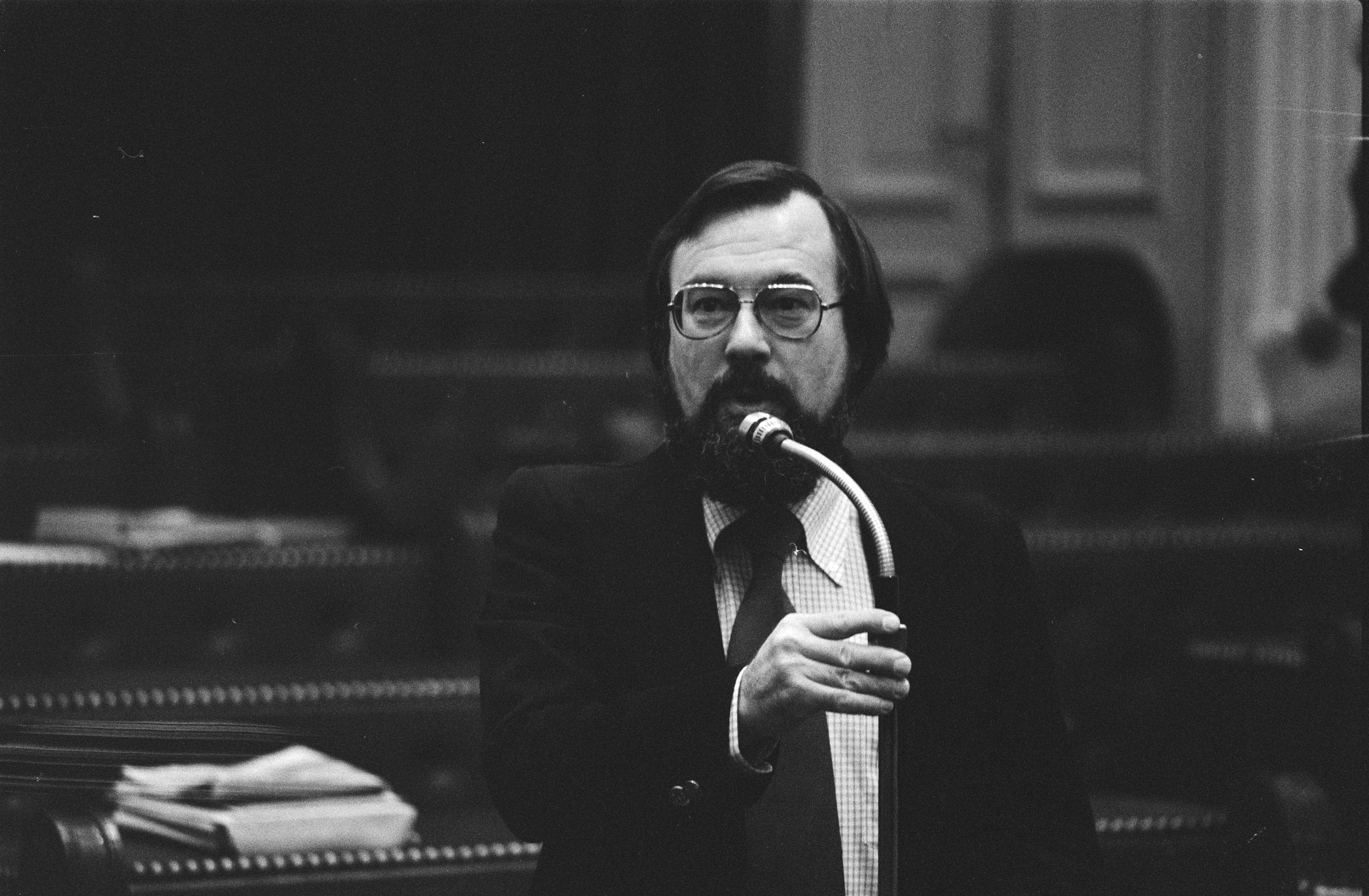 Collectie / Archief : Fotocollectie Anefo Reportage / Serie : [ onbekend ] Beschrijving : Tweede Kamer debat; Molleman (PvdA) Annotatie : nr. 2 Terpstra (VVD), nr. 4, 5 Waltmans (PPR) Datum : 8 november 1978 Locatie : Den Haag, Zuid-Holland Trefwoorden : parlementaire debatten, politici, portretten Persoonsnaam : Molleman, H.A.A. Fotograaf : Suyk, Koen / Anefo Auteursrechthebbende : Nationaal Archief Materiaalsoort : Negatief (zwart/wit) Nummer archiefinventaris : bekijk toegang 2.24.01.05 Bestanddeelnummer : 929-9855